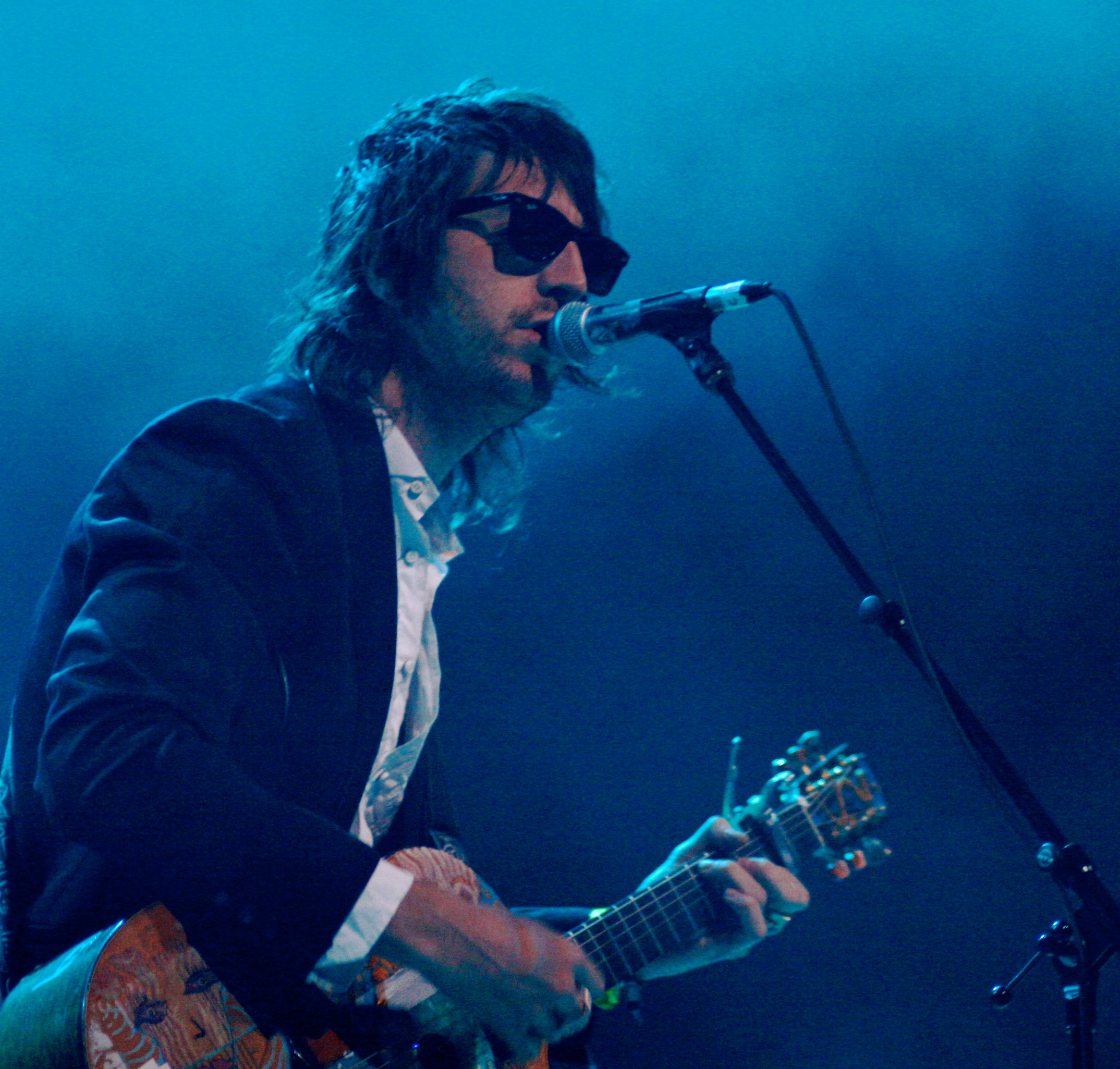 Concierto de Joseph Arthur en el Primavera Club 2007